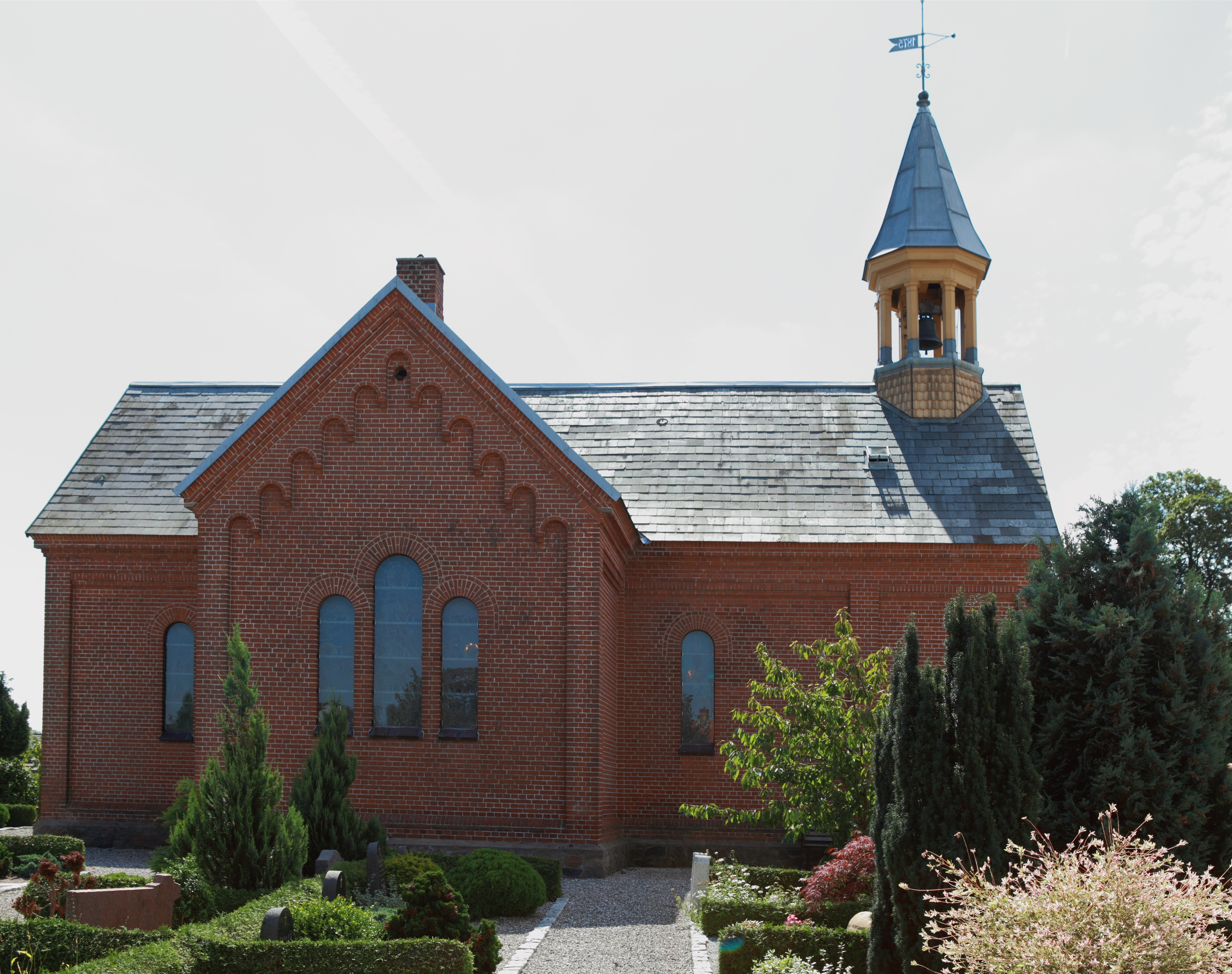 Voel Kirke